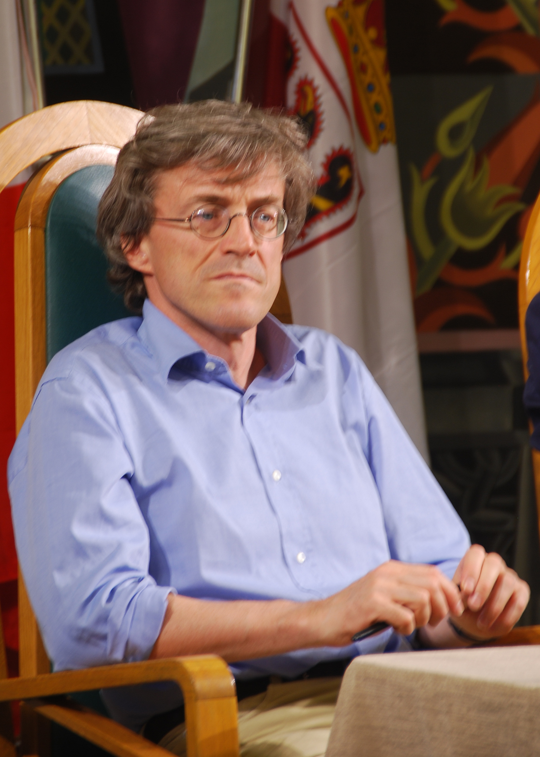 L'economista Roberto Perotti al Festival dell'Economia di Trento 2009.